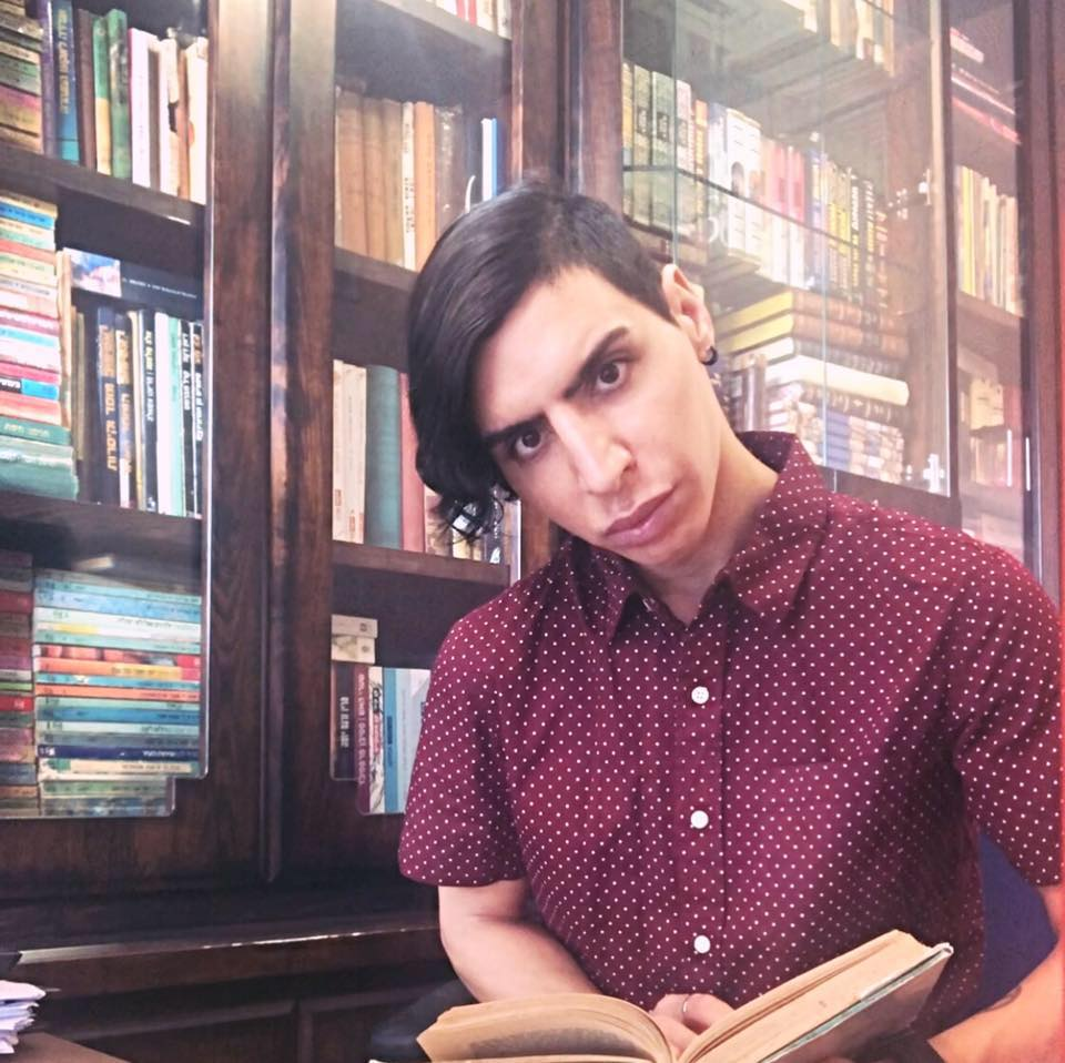 ניקולא יוזגוף אורבך